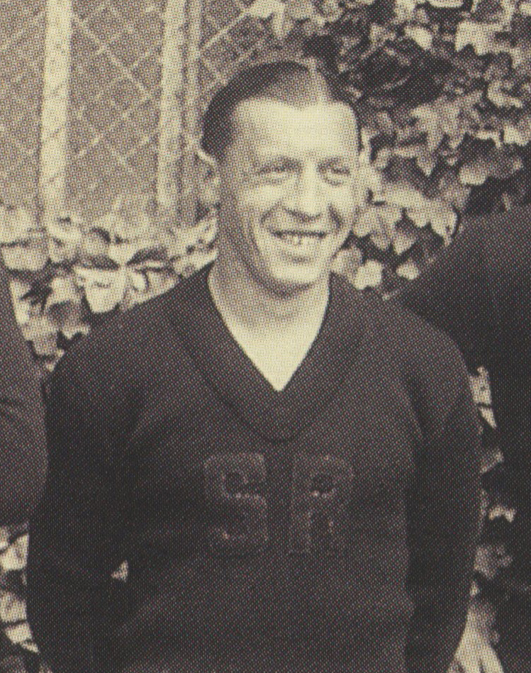 Le joueur du Stade rennais Jean Laurent avant la finale de la Coupe de France 1935.